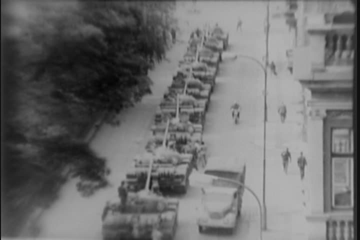 Sovětské okupační síly.